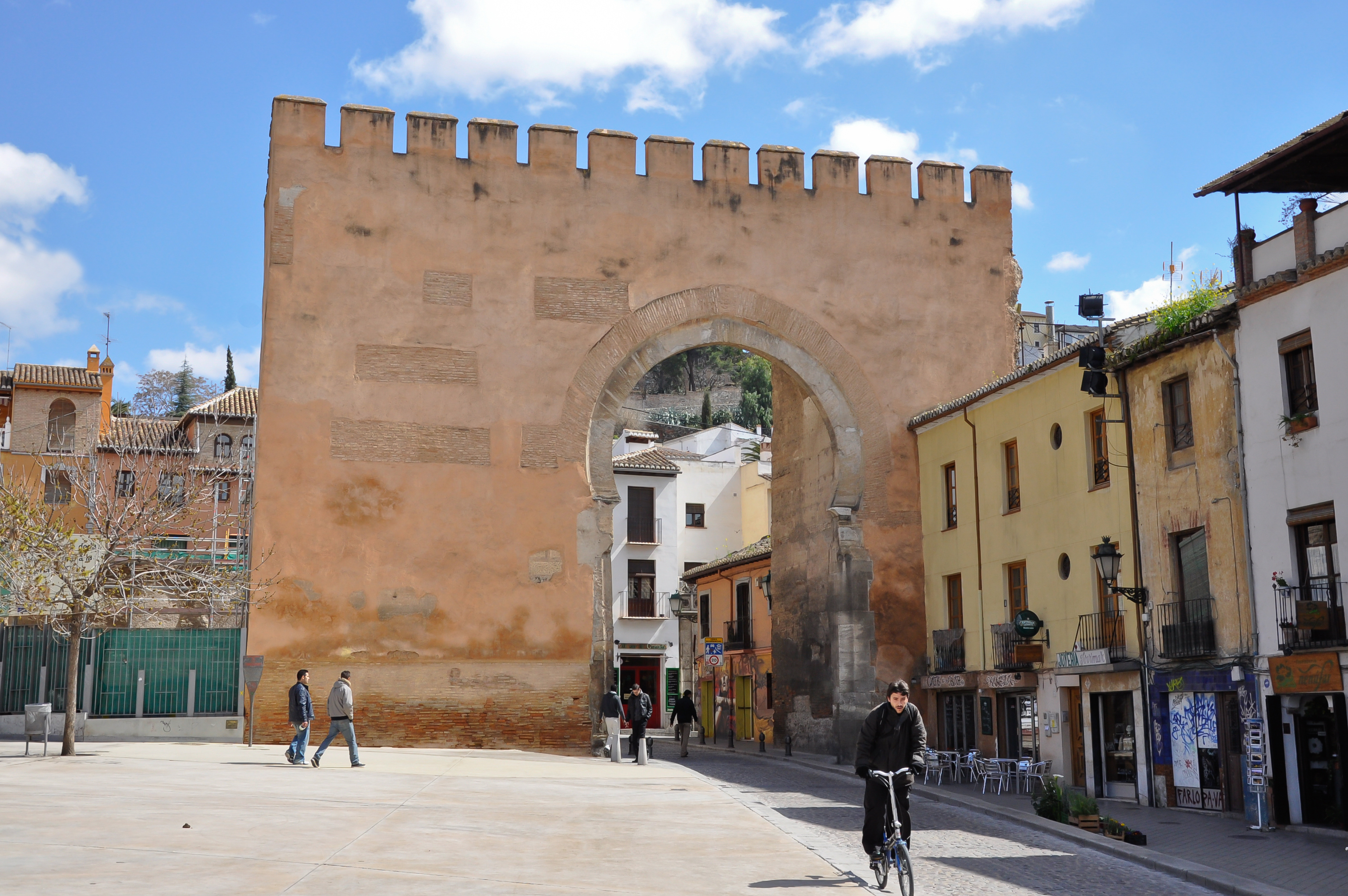 Puerta de Elvira in Granada, Spanje.